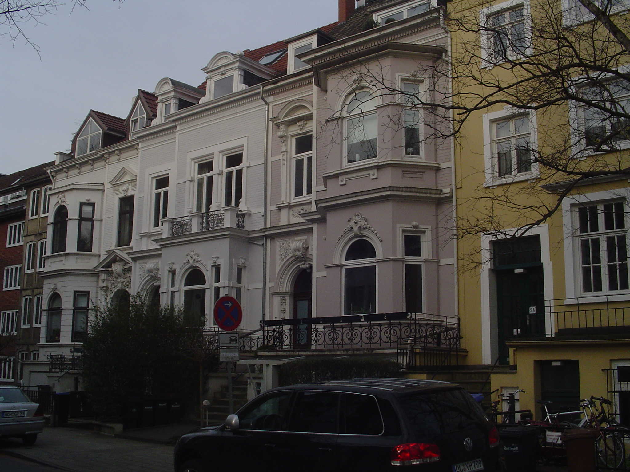 Häuserzeile am Barkhof in Bremen-Schwachhausen